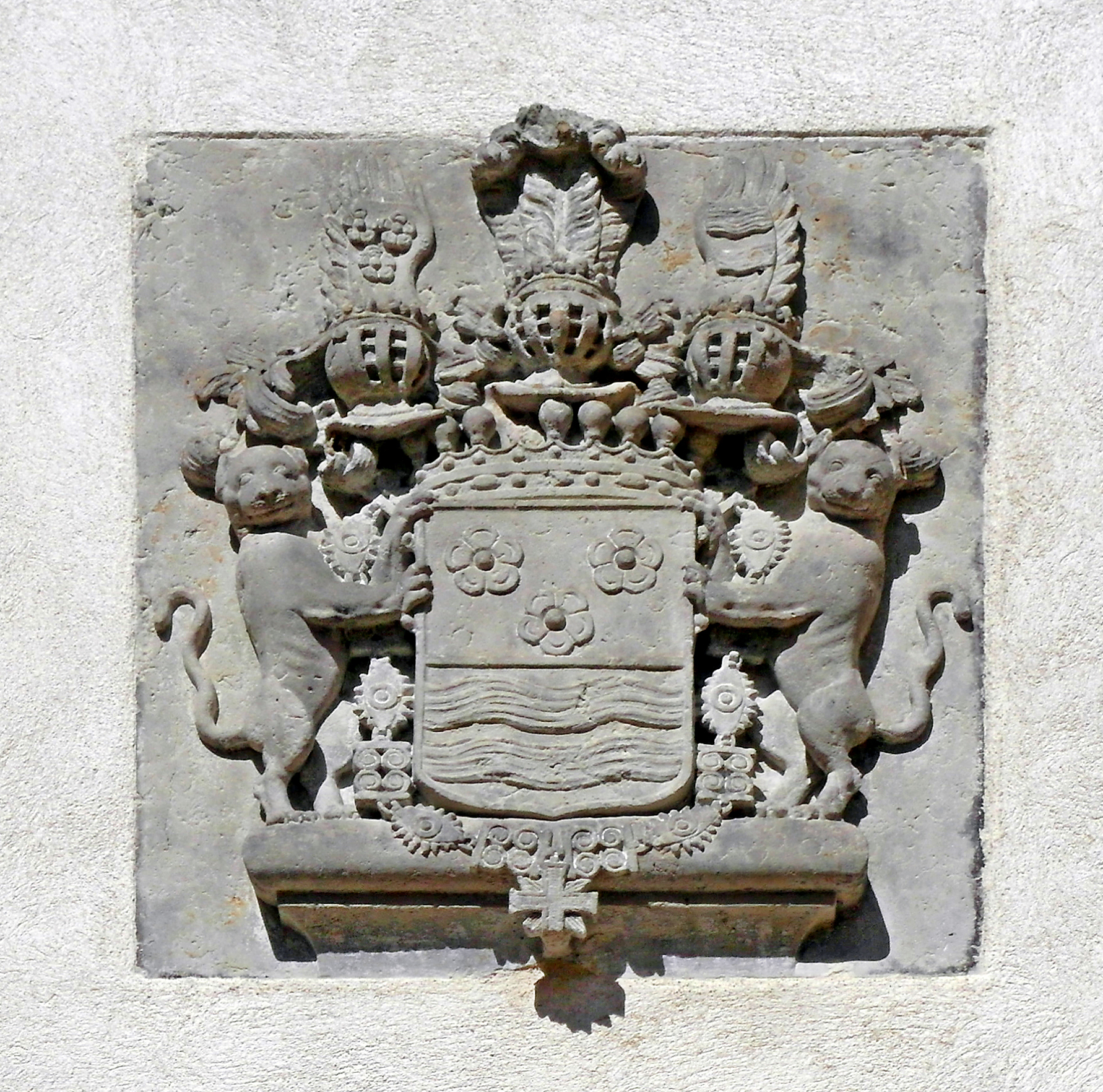 06.04.2017 02681 Crostau, Am Park 4 (GMP: 51.083319,14.453167): Renaissanceschloß, erbaut unter Rudolf von Rechenberg, 2. Hälfte 16. Jh., 1860 im Stil der deutschen Renaissance umgebaut. Wappen der Grafen von Riaucour links vom Eingang. [SAM9282.JPG]20170406420DR.JPG(c)Blobelt